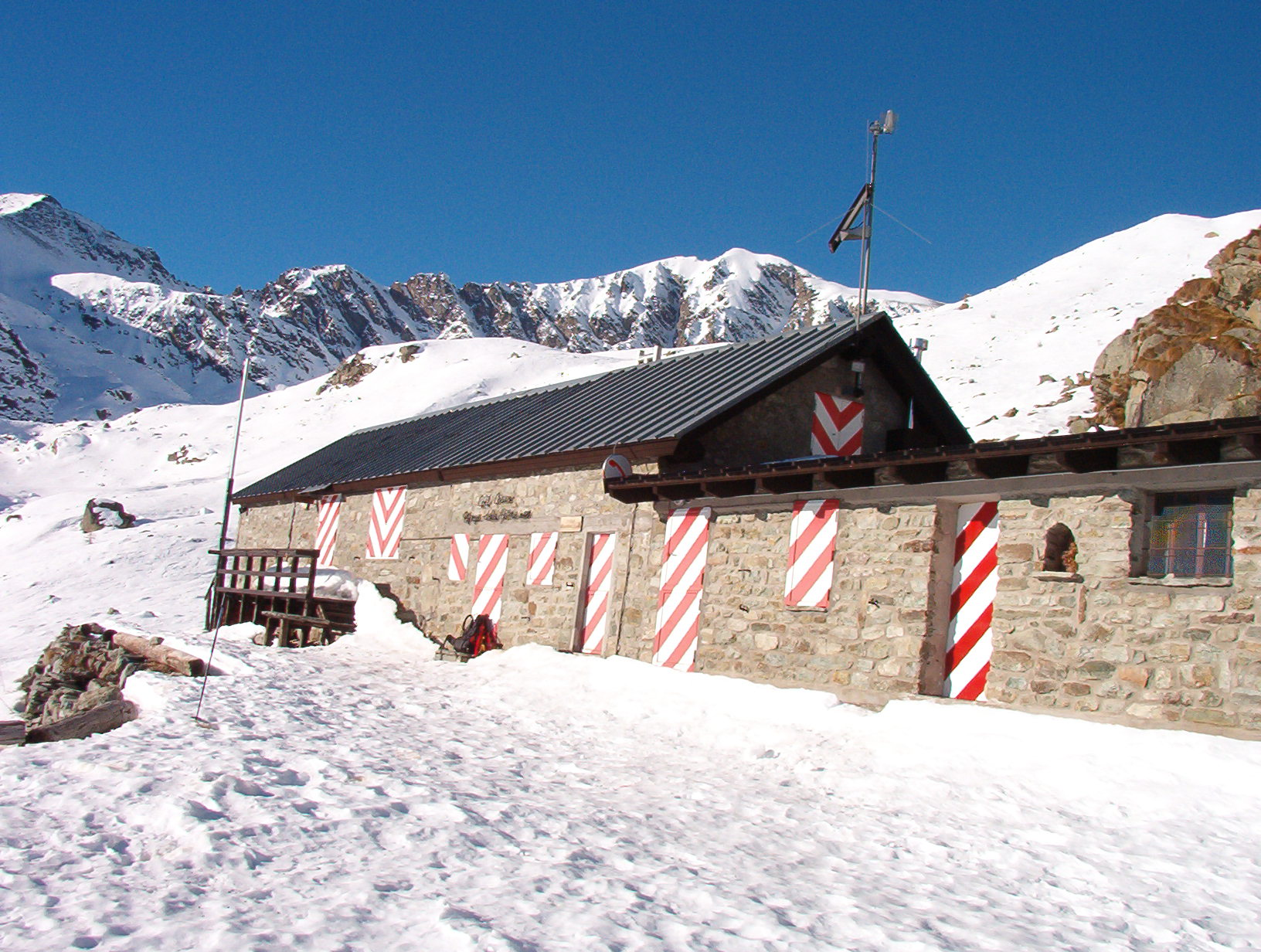 Rifugio Balma, , Provincia di Torino, Italy